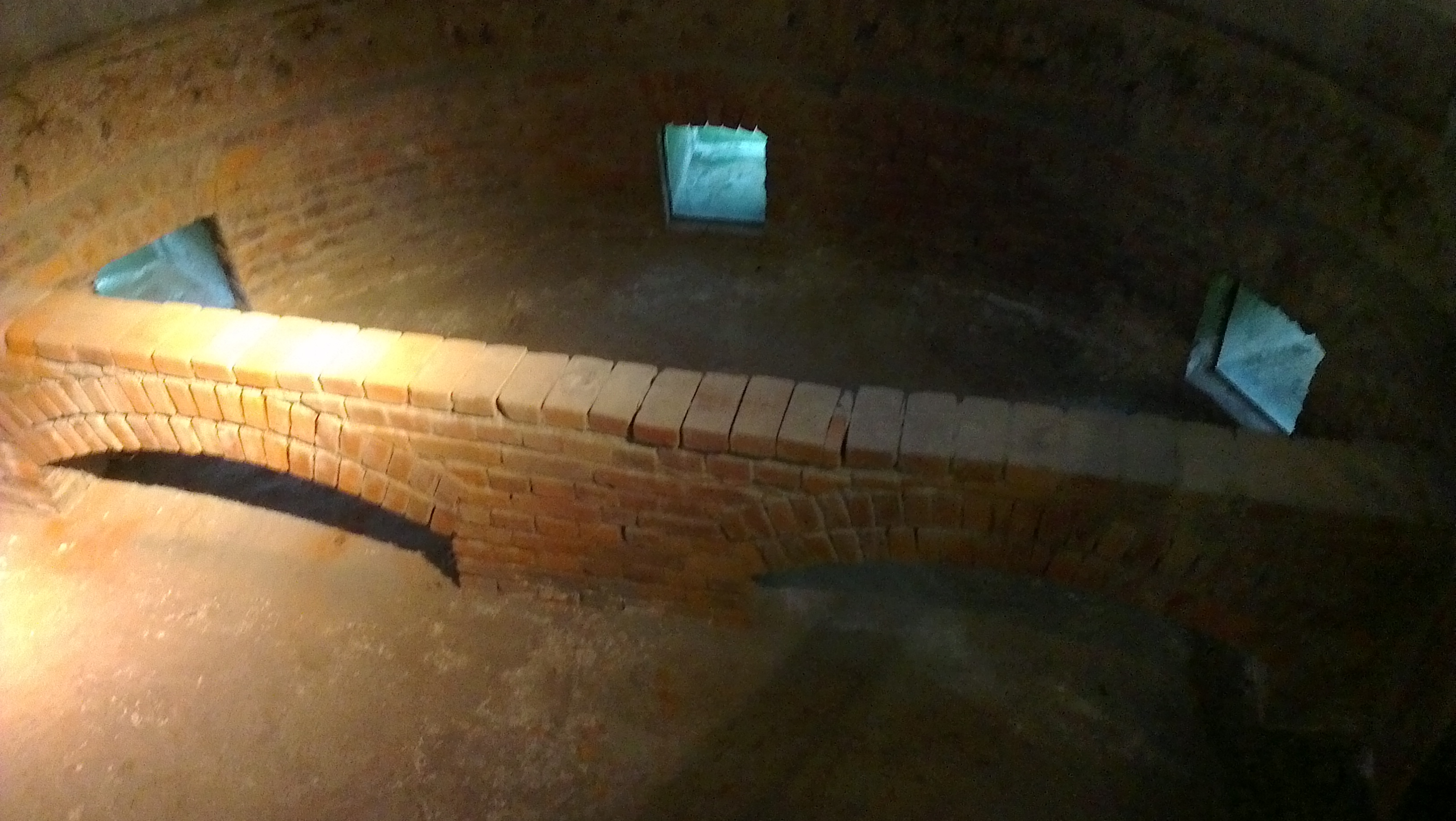 國立台灣文學館 地樑